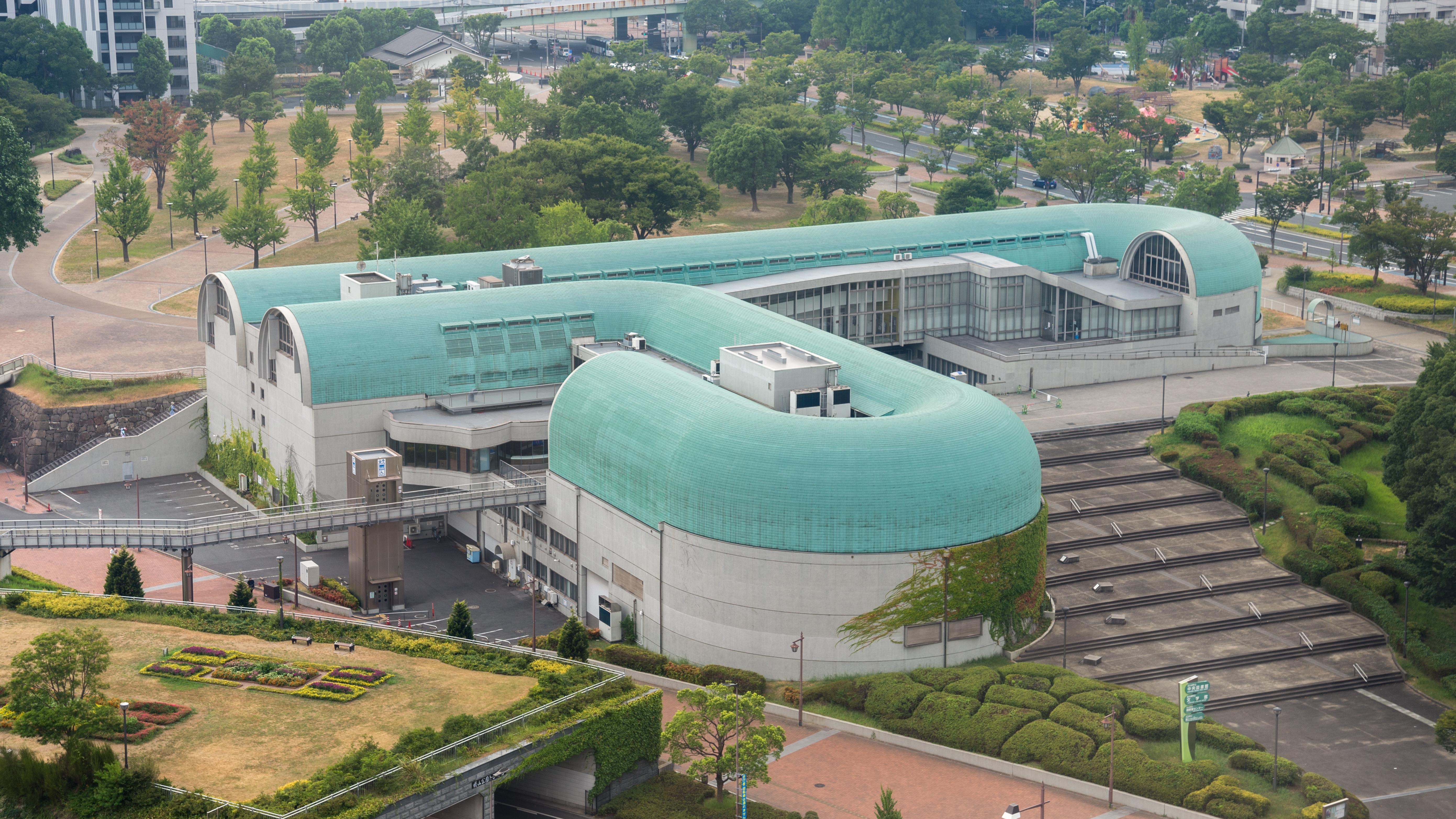 北九州市立中央図書館及び北九州市立文学館 撮影場所：福岡県北九州市小倉北区城内4番1号 設計者：磯崎新